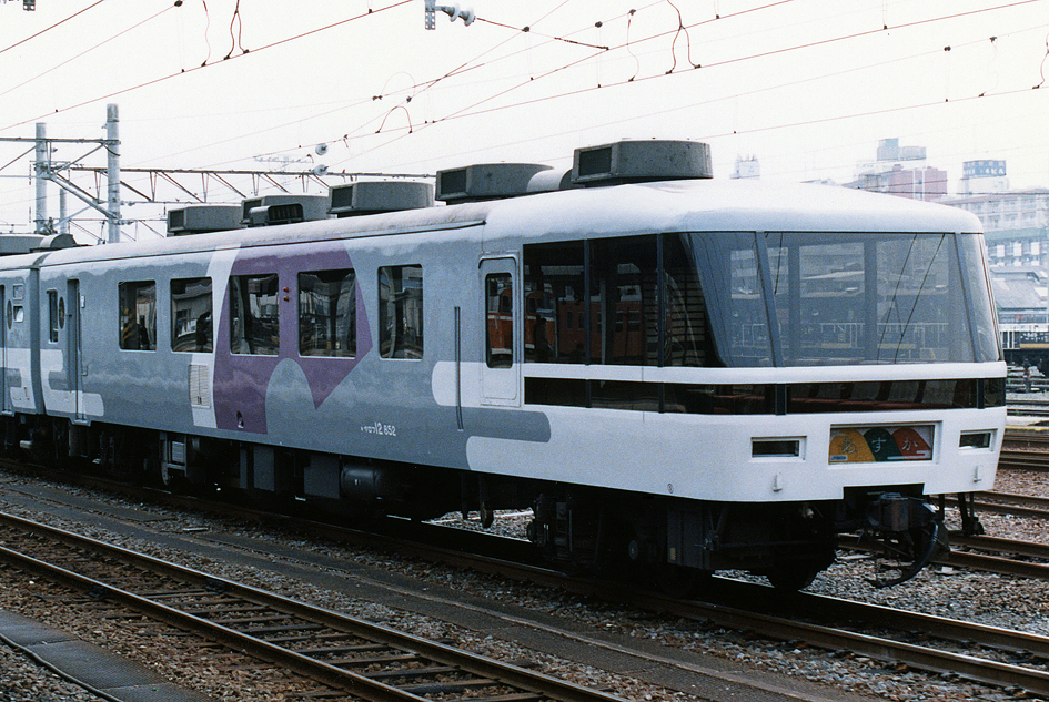 JR西日本 12系・14系和風客車「あすか」 7号車 マロフ12 852